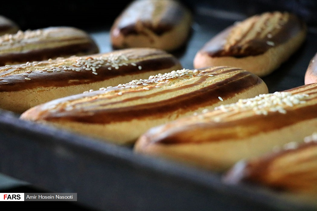 چای چورگی